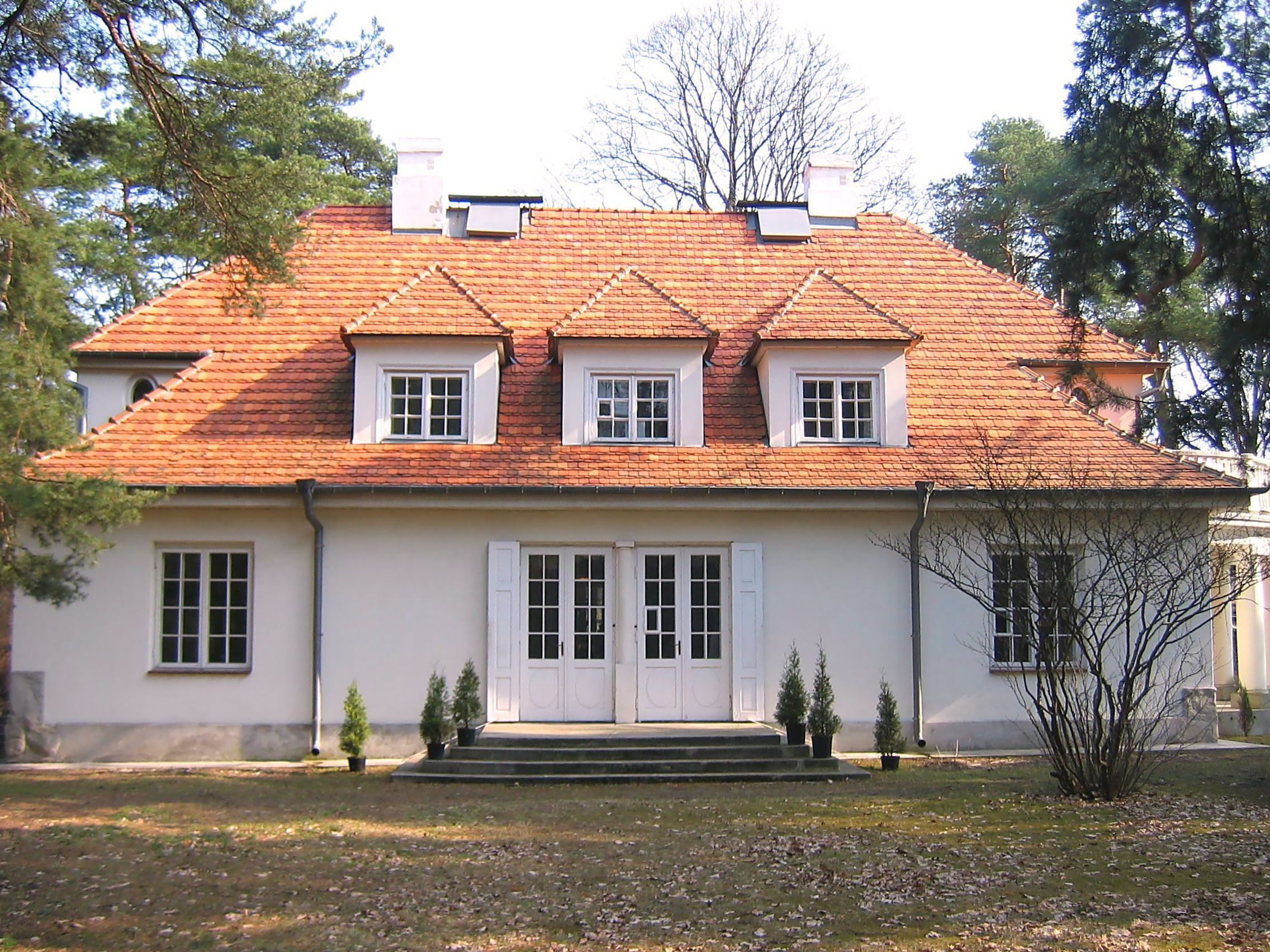 Milusin - villa of marshal Józef Piłsudski in Sulejówek